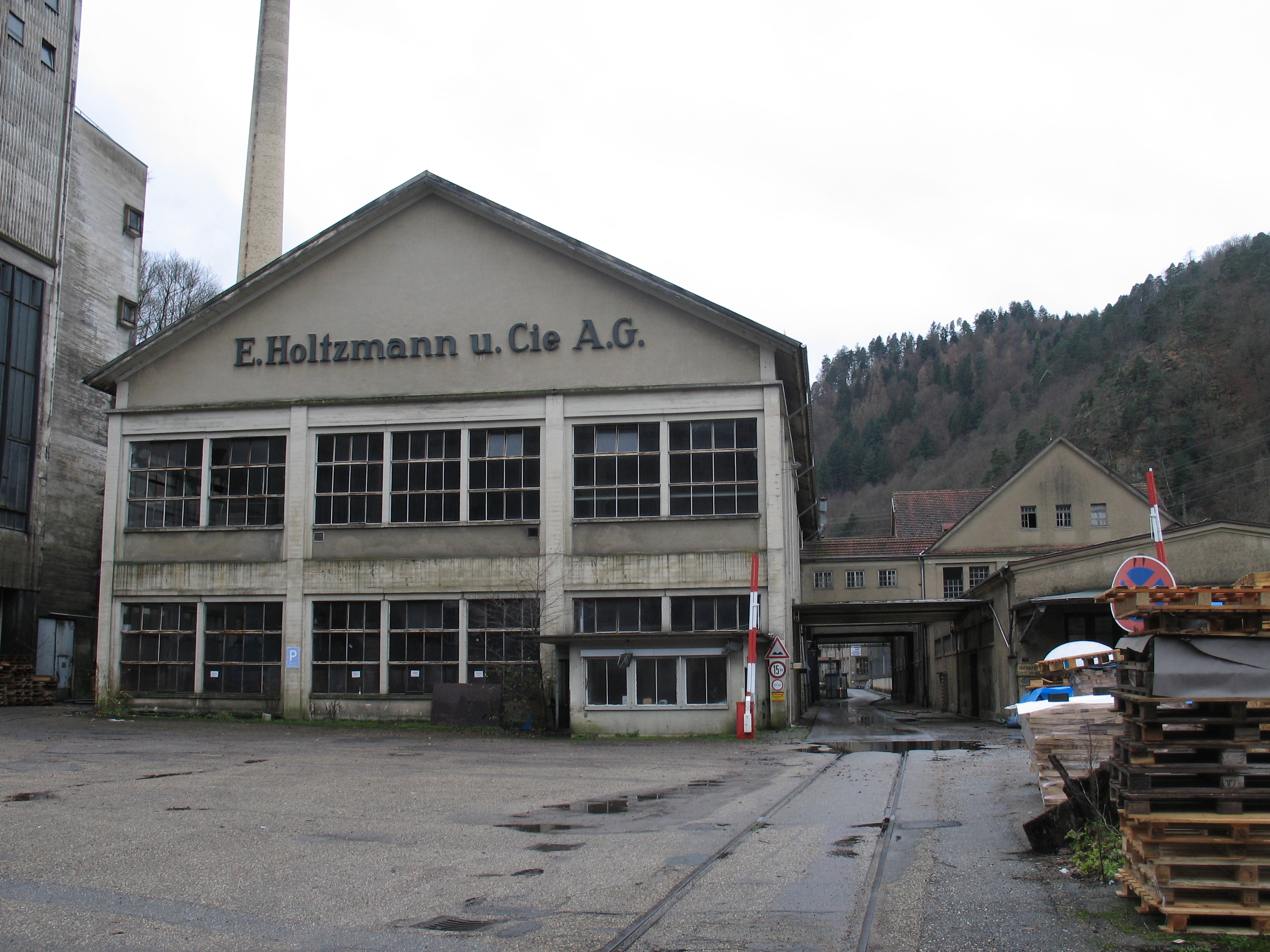 Teilansicht der Produktionsstätte Breitwies des ehemaligen Papierherstellers E. Holtzmann & Cie. AG - Weisenbachfabrik/Murgtal Fotografiert von Der Bruzzla am 5. Dezember 2006